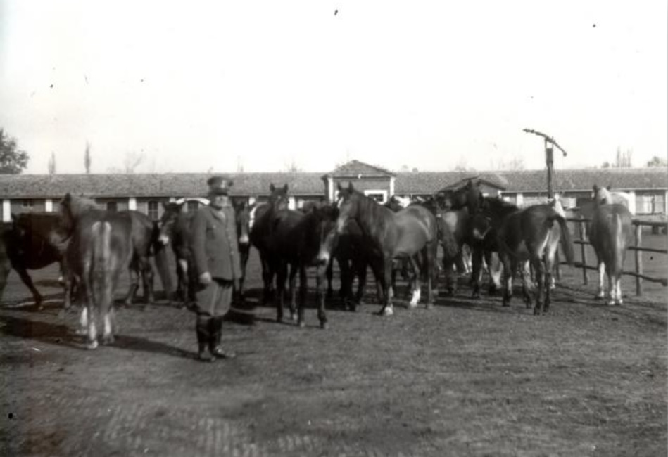 Capobuttero del Centro di Allevamento Quadrupedi di Portovecchio (Mirandola)